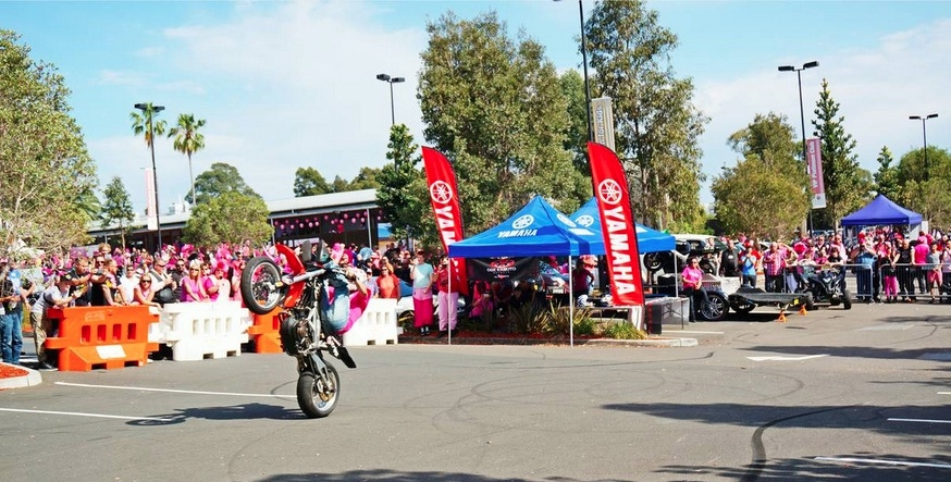 Dave McKenna